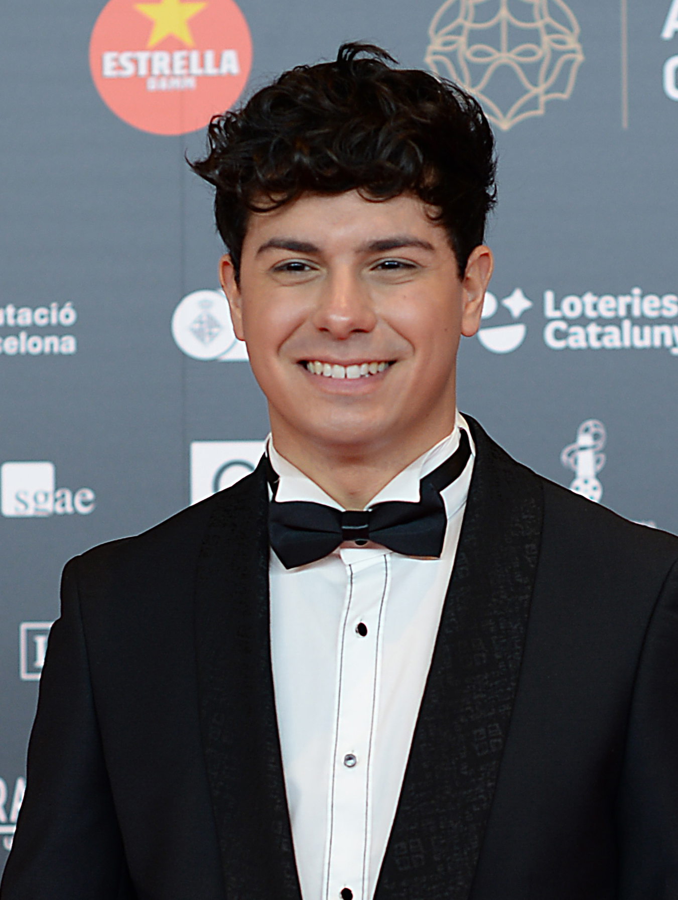 Alfred García, cantant, XII Premis Gaudí (2020)